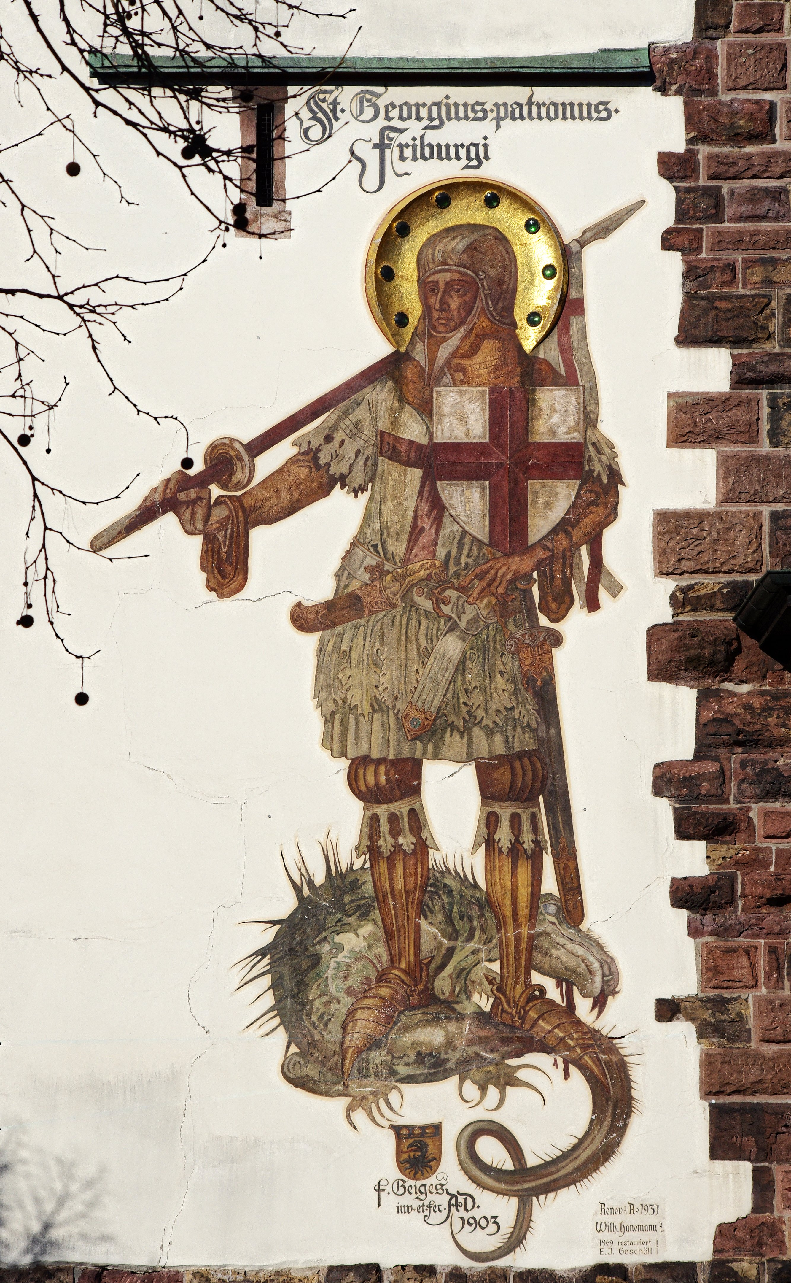 Die Darstellung des Patrons von Freiburgs St. Georg auf dem Schwabentor (Leif Geiges, 1903).